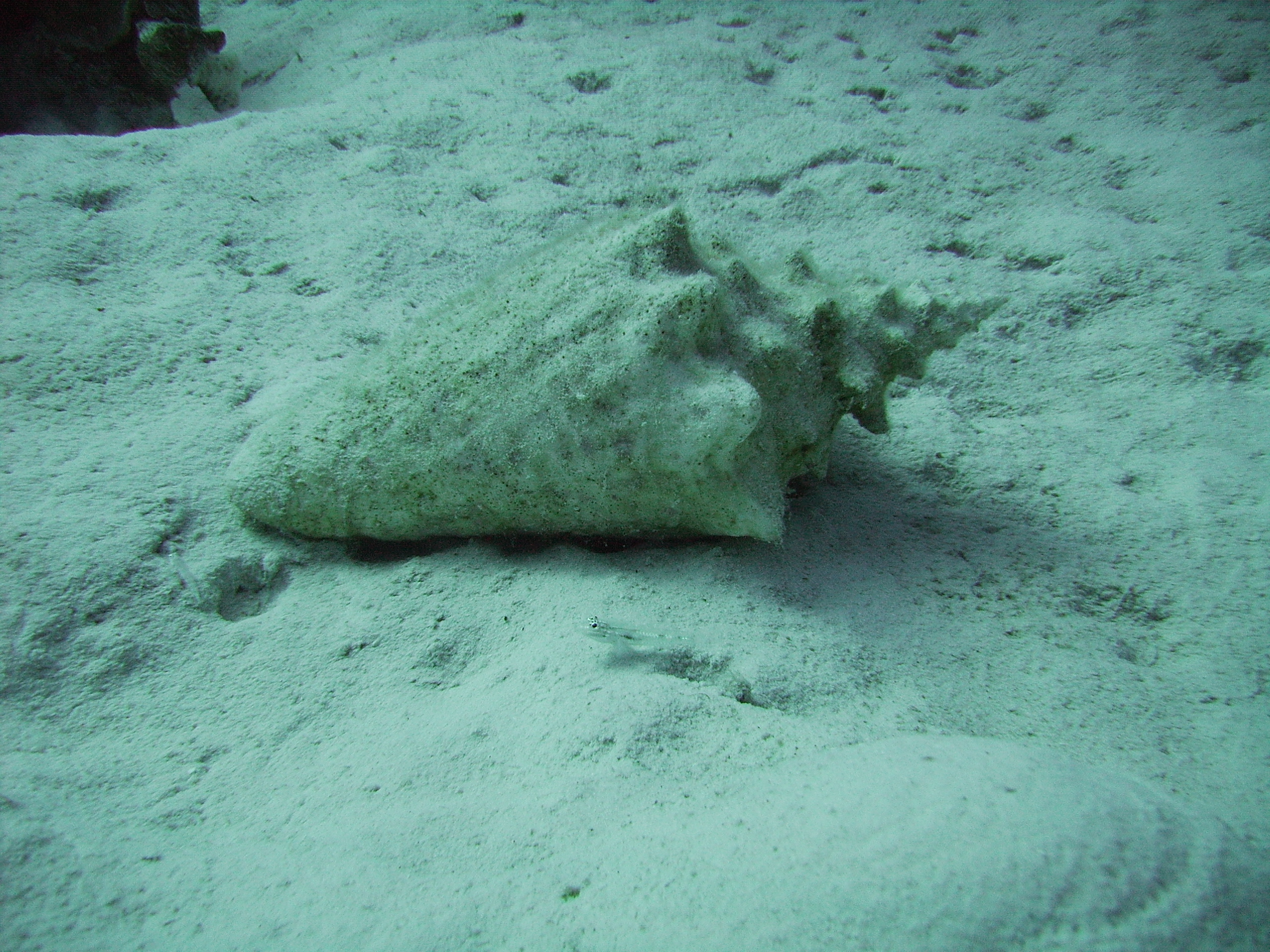 Fechterschnecke